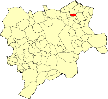 Mapa municipal de Albacete con el municipio de Abengibre resaltado en rojo.